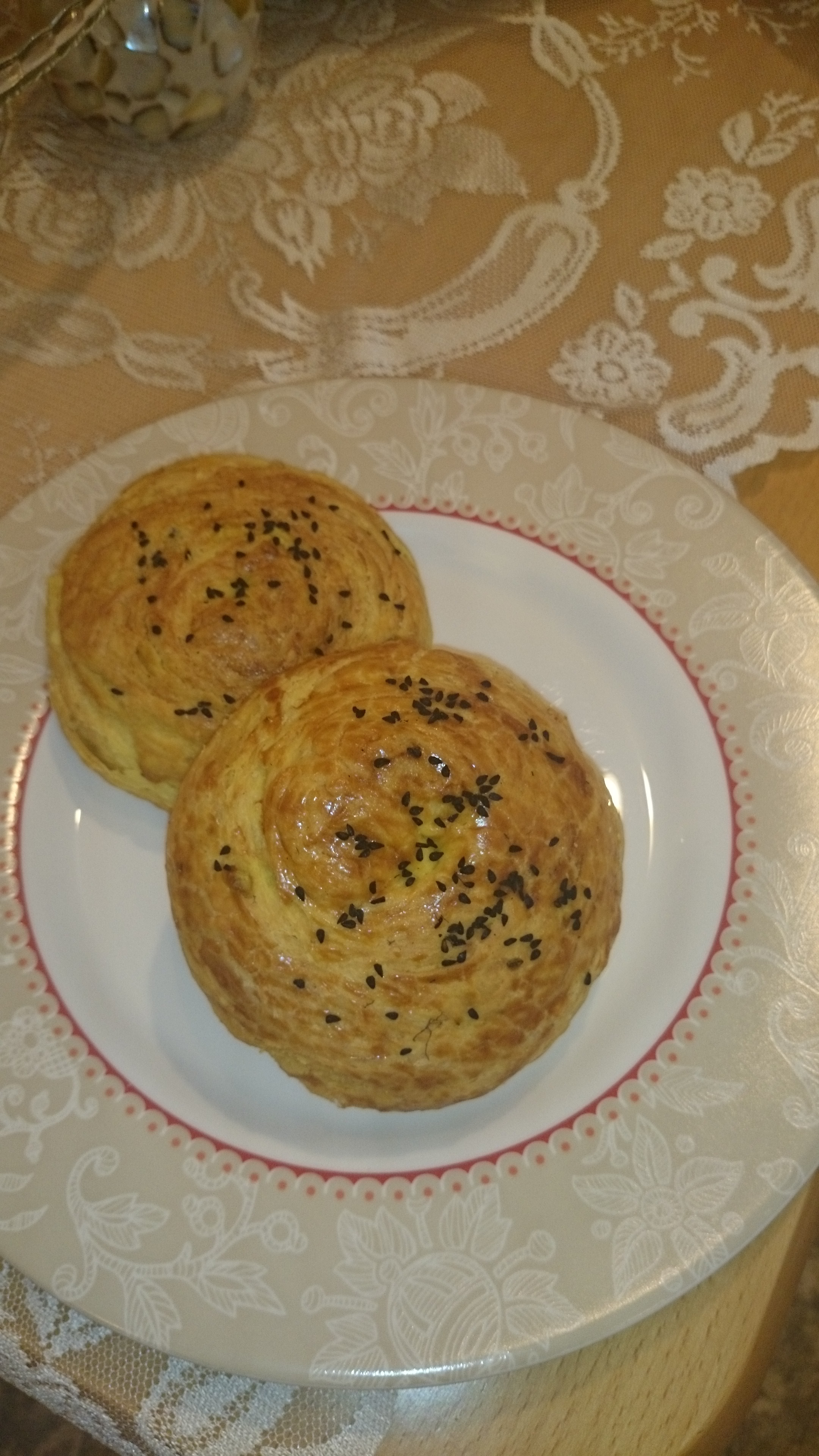 Şorqoğal